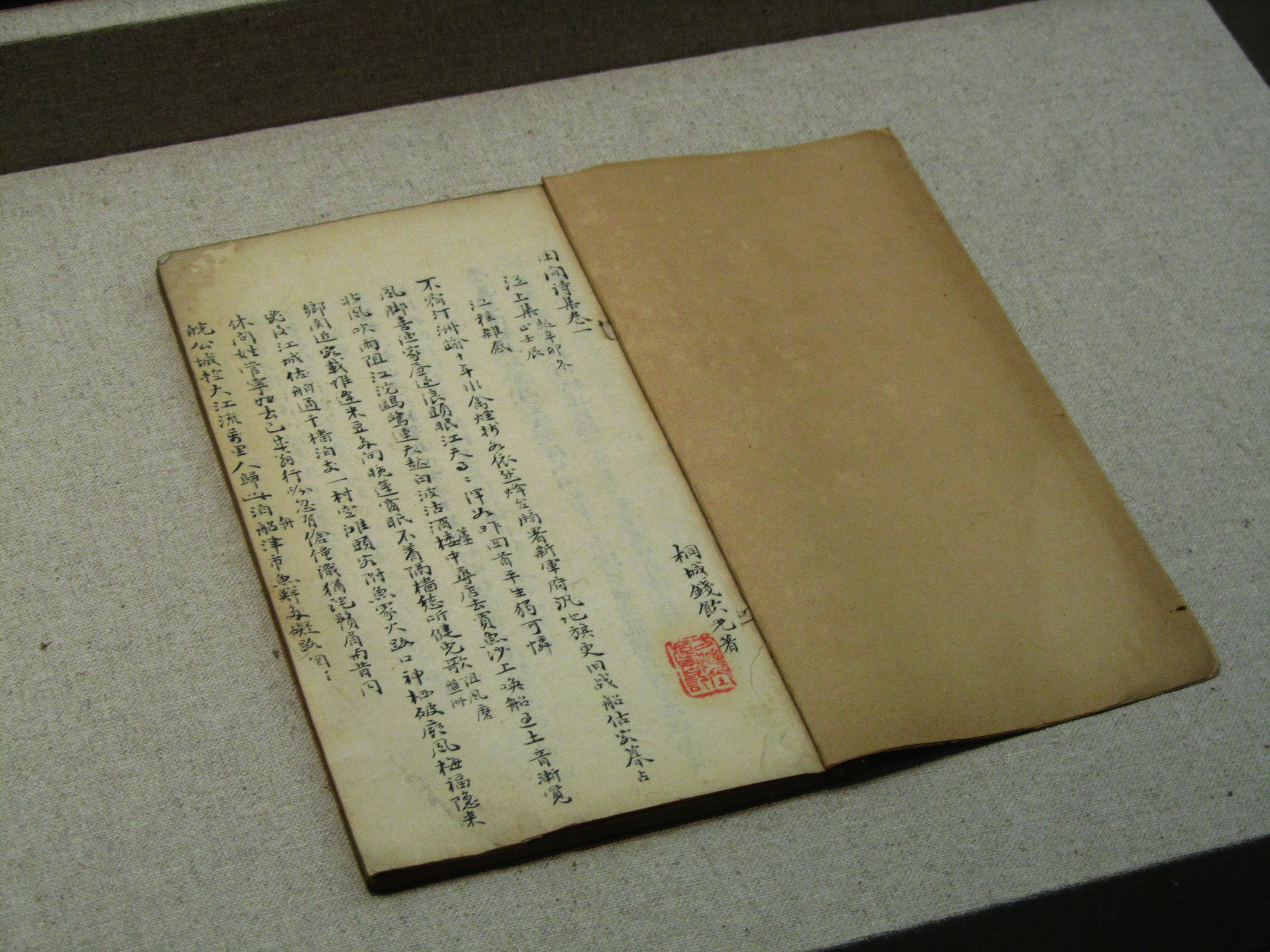 钱澄之《田间诗集》，藏于安徽博物院。